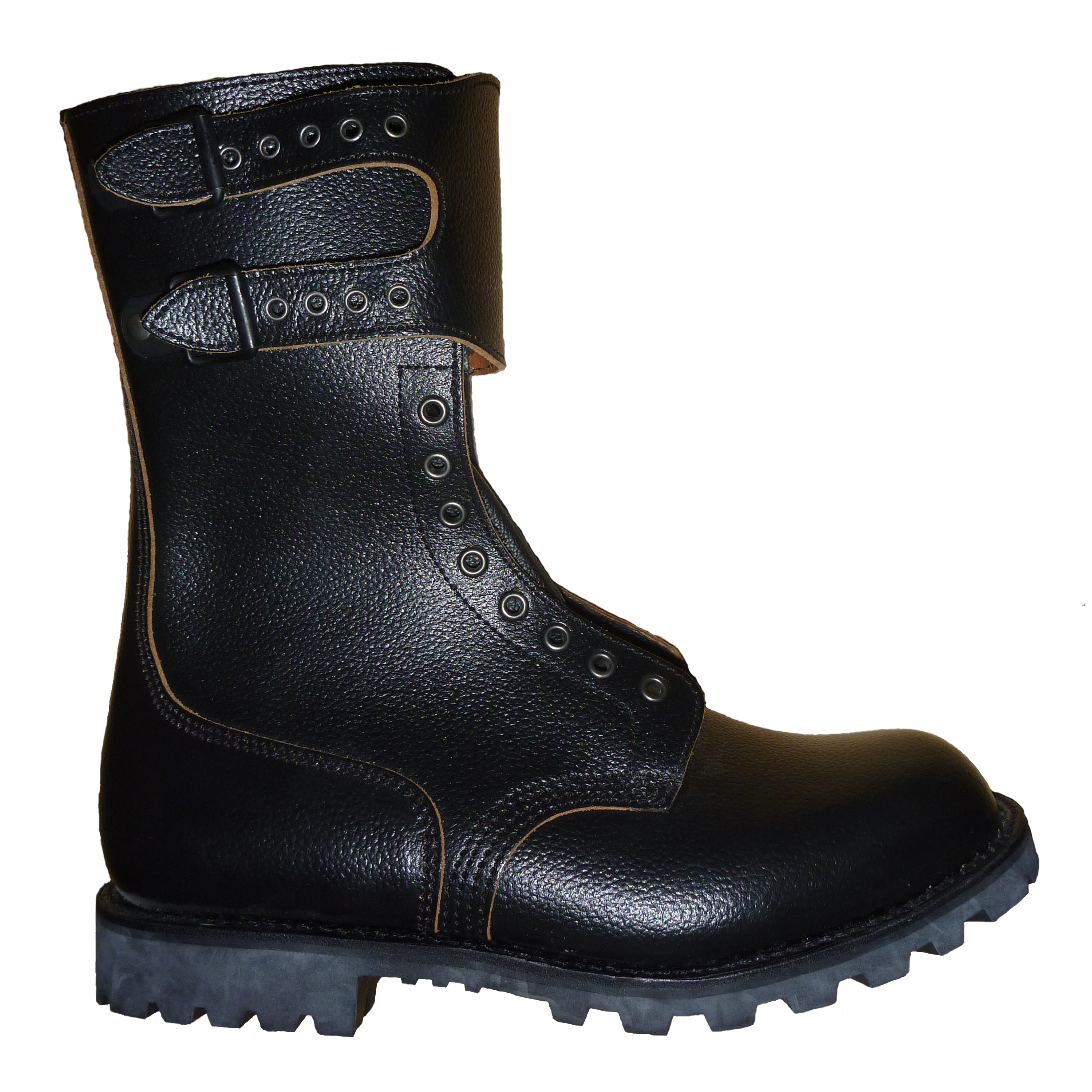 Photo d'une rangers en cuire neuve, modèles réglementaire de l'Armée française (années 2000-début années 2010). Dans le jargon militaire, elles sont appelées BMJA (Brodequin de Marche à Jambière Attenante), et aussi connues en tant que BM65 (Brodequin de Marche modèle 1965).